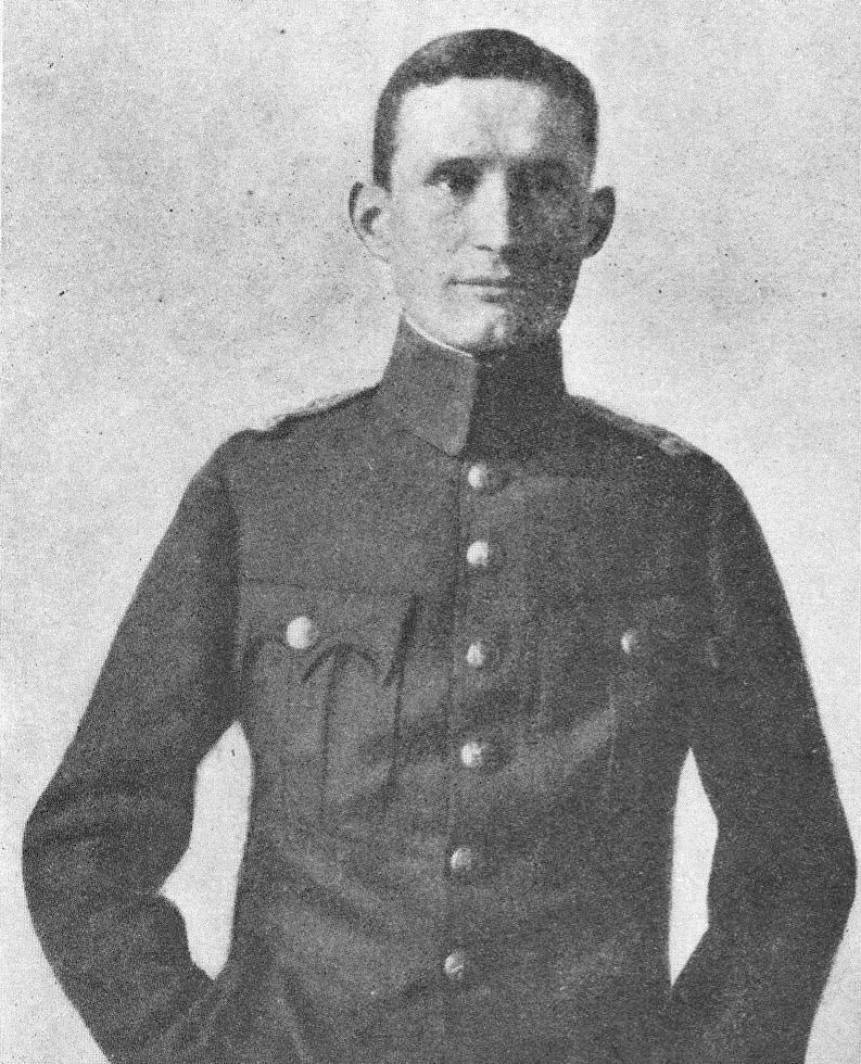 Kapitan Roman Florer w 1919 roku